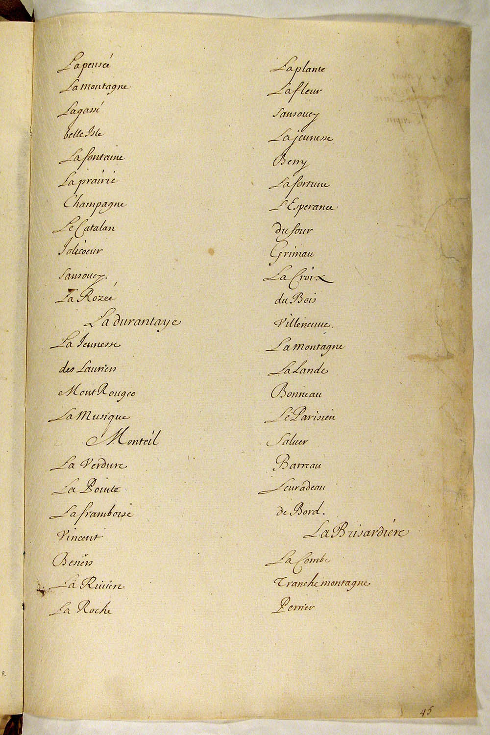 Rolle des Soldats du Regiment de Carignan-Salières qui se sont faits habitans de Canada en 1668